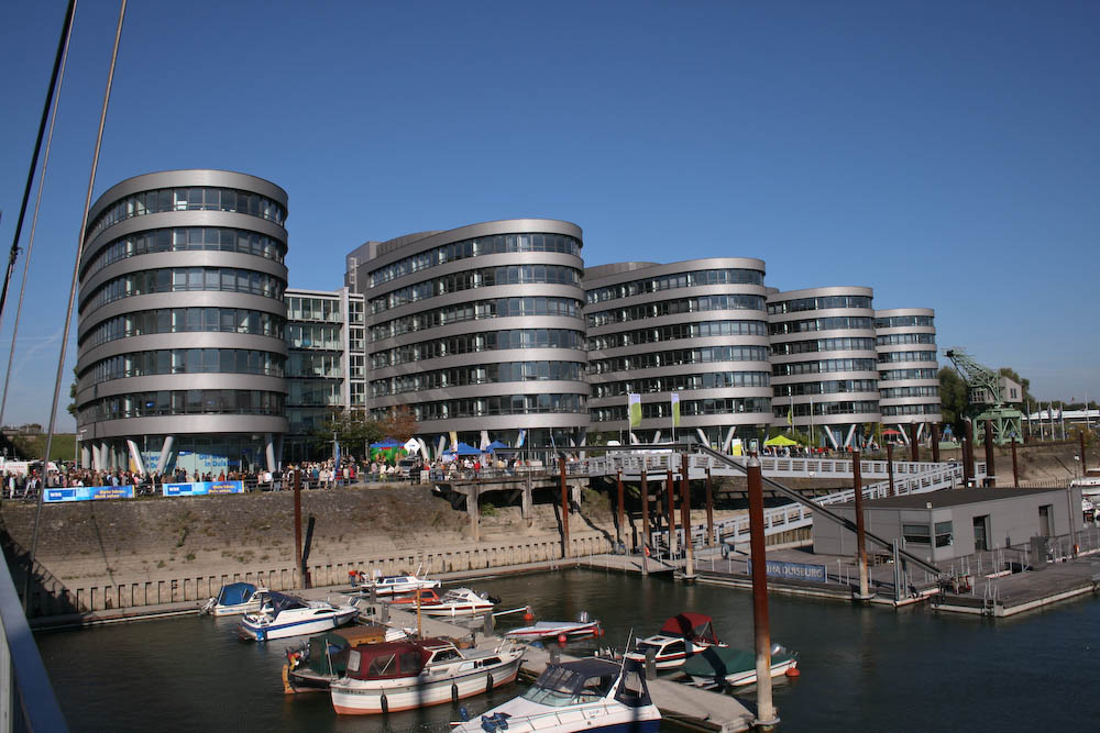 Marina Duisburg am Innenhafen